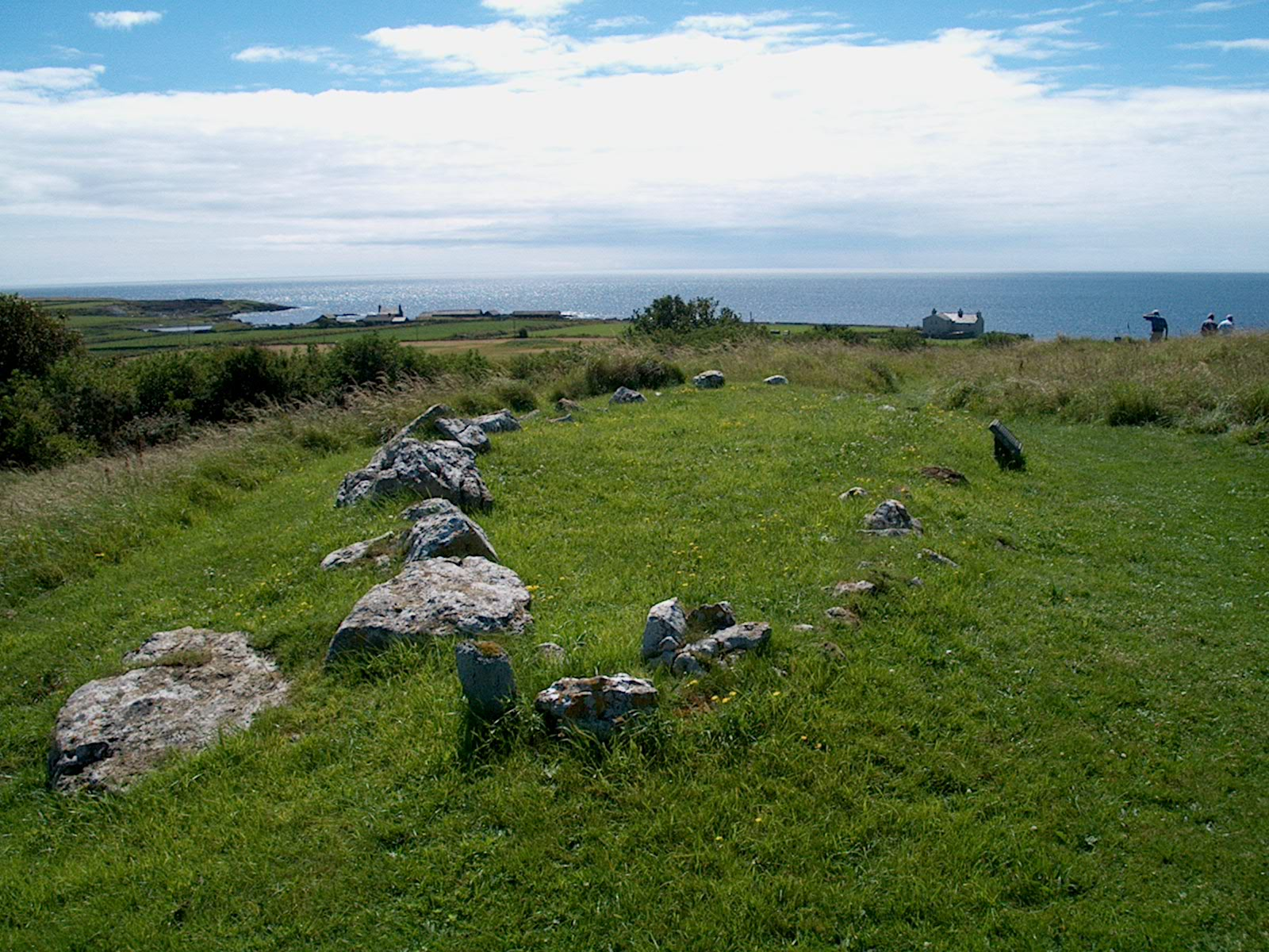 Skipsgrava på Chapel Hill, Balladoole, vart i si tid lagt på den mest framtredande staden på ein kristen gravplass.